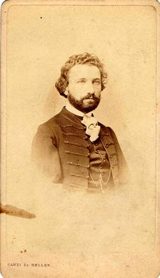 Pauli Richárd (1835-1901) magyar operaénekes (tenor) kb. 30 éves korában